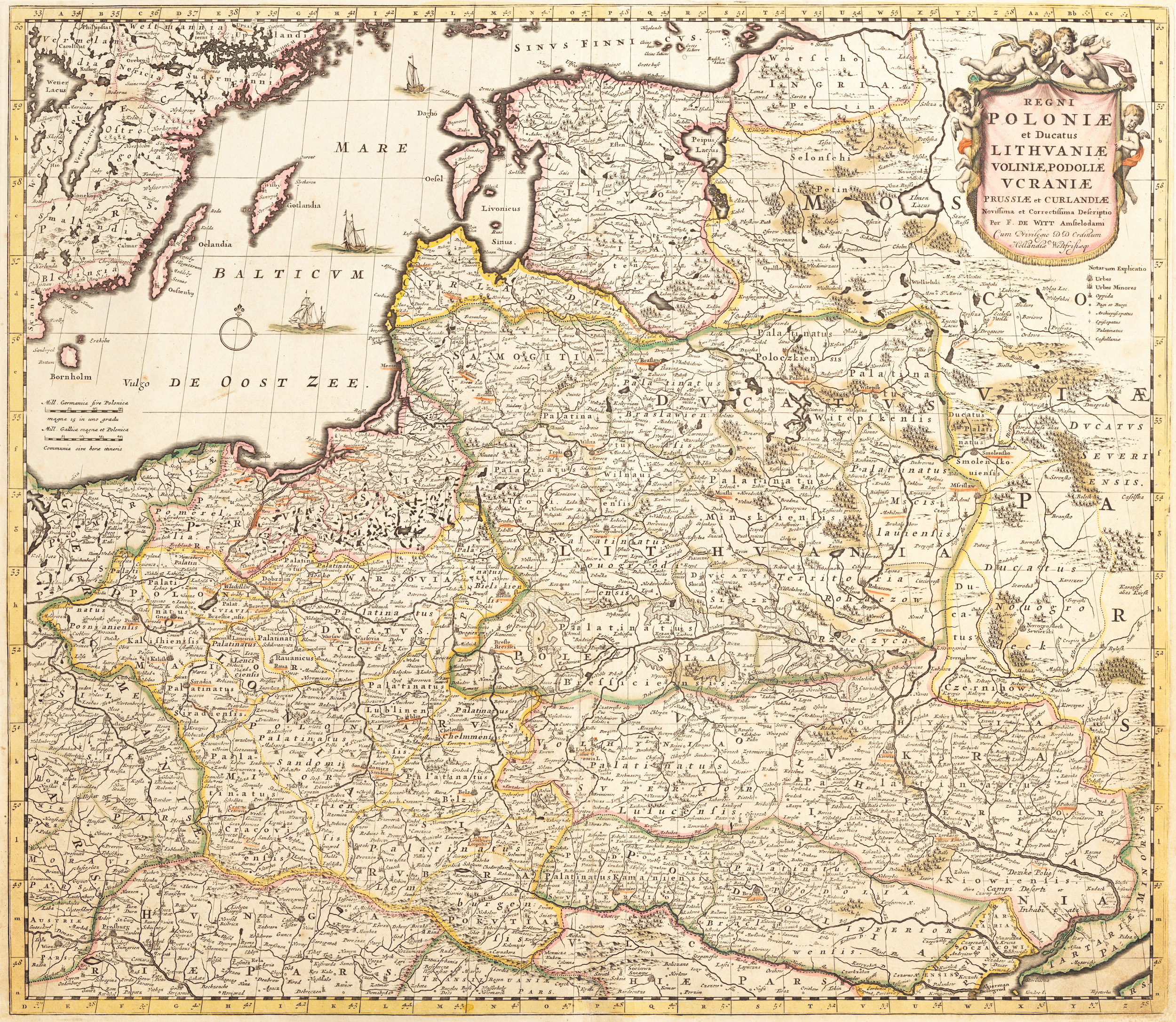 Regni Poloniae et Ducatus Lithuaniae Voliniae, Podoliae Ucraniae Prussiae, Frederick De Witt (Amsterdam,1689-1700) «Карта Речі Посполитої, князівства Литовського, Волині, Поділля, України, Прусії, Лівонії та Курляндії» [Regni Poloniae et Ducatus Lithuaniae Voliniae, Podoliae Ucraniae Prussiae, Livoniae, et Curlandiae] вперше видана у 1675 р. голландцем Фредеріком де Віттом. Територія України позначена на карті шрифтом великого розміру, що свідчить про увагу автора до цих територій. Карту неодноразово перевидавали, наведений примірник датований 1680 р.